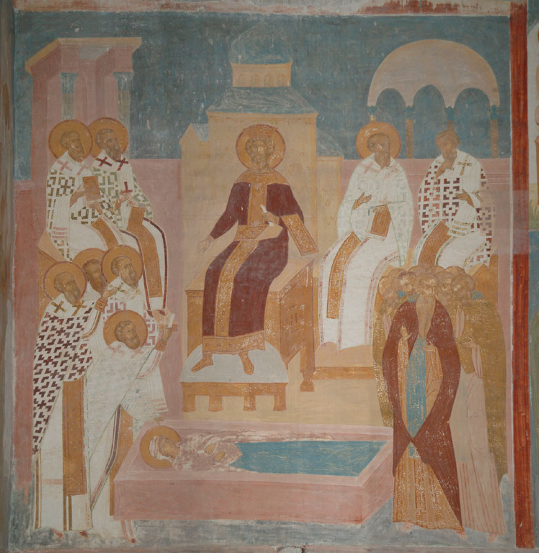 «Четвёртый Вселенский Собор». Фреска храма Рождества Богородицы (Ферапонтов монастырь). Четвёртый вселенский собор – Халкидонский, проходил в 451 году в Халкидоне при императоре Маркиане. Собран против архимандрита Евтихия, который отвергал человеческую сущность Христа, и признавал только Божественную (это учение носит название монофизитство). На соборе присутствовало 650 епископов, которые осудили это лжеучение.